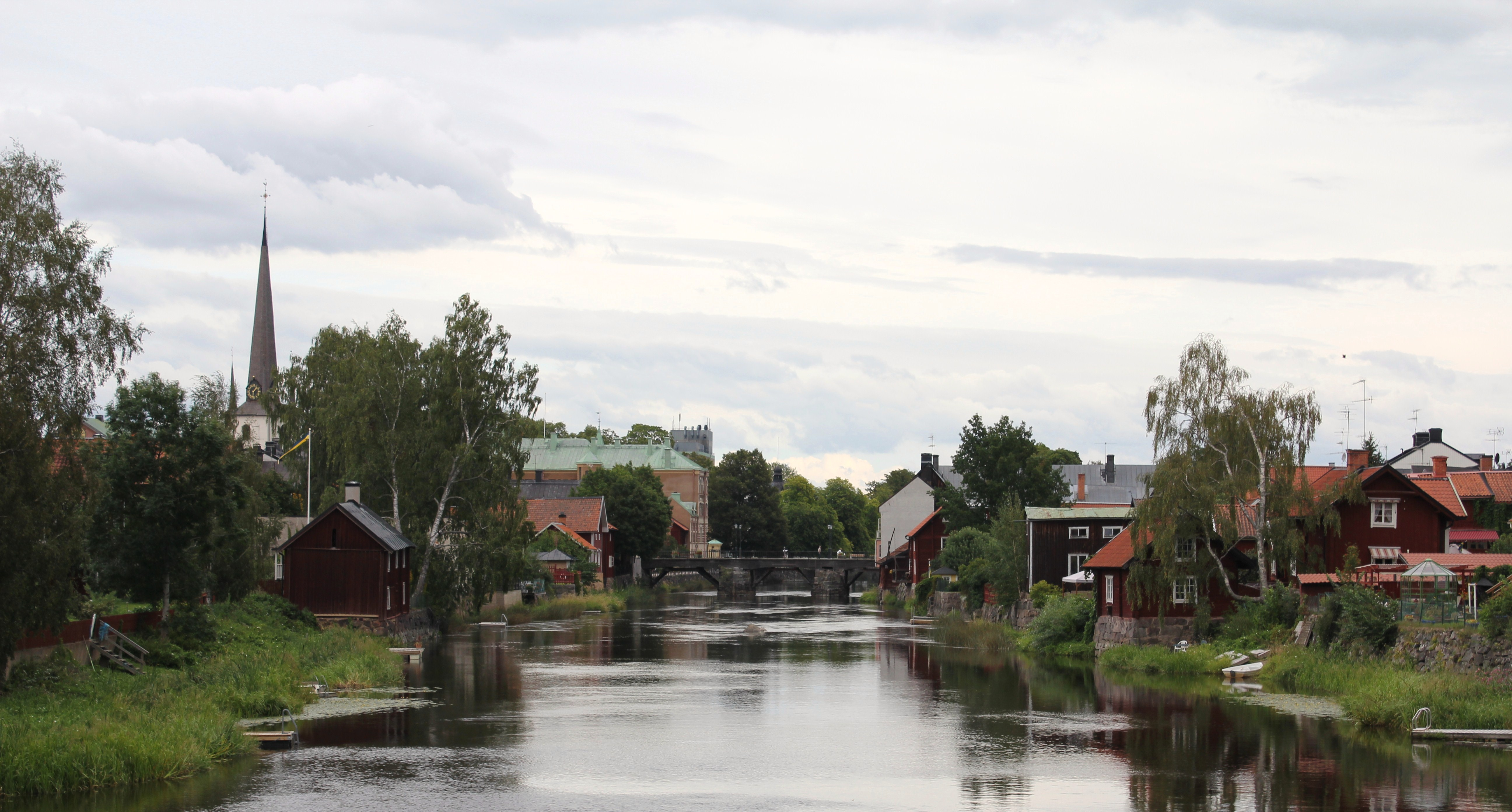 Arboga. Bild tagen från Strömsnäsbron.